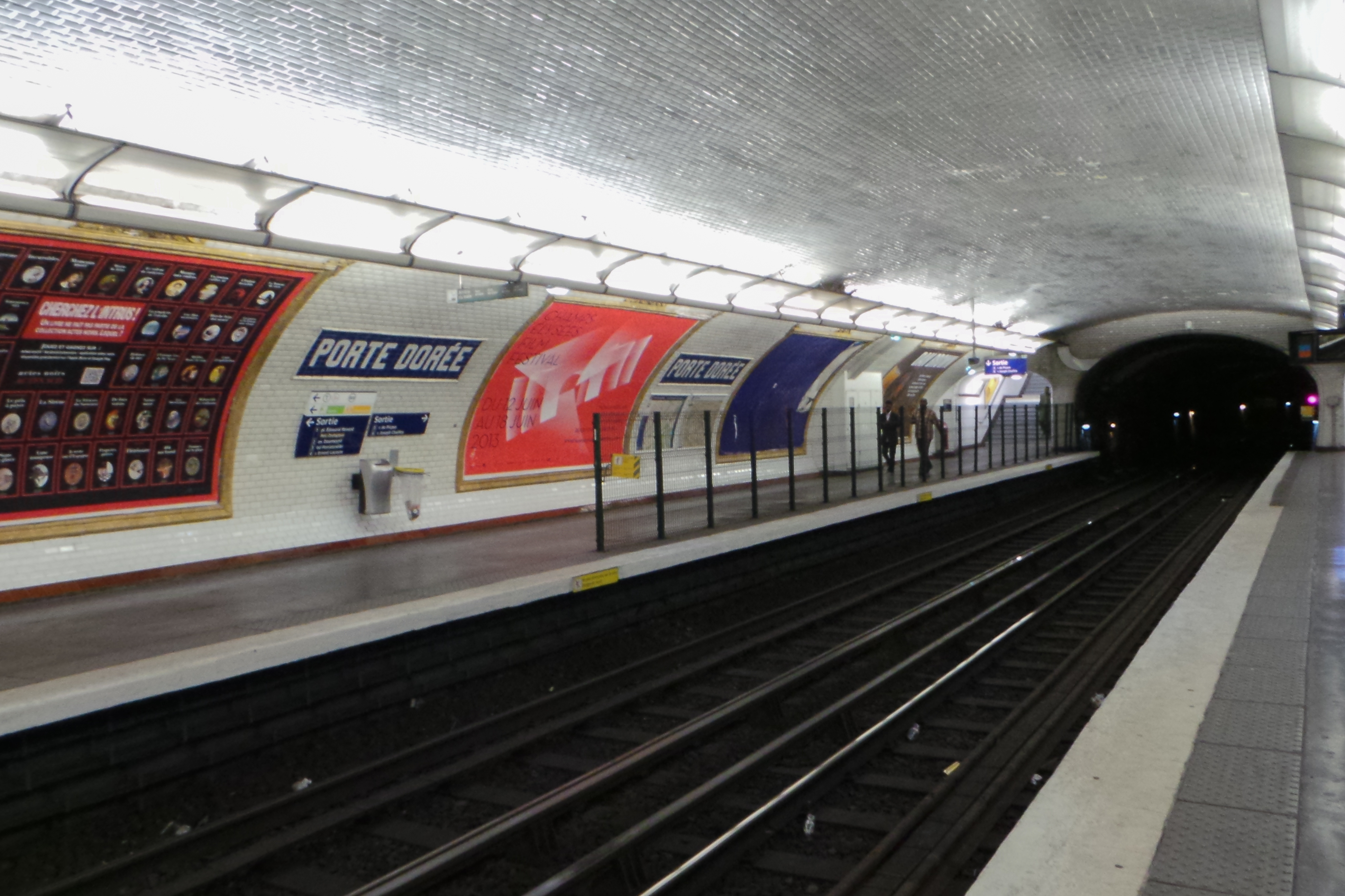 Station de métro Porte Dorée, ligne 8 du métro de Paris - Paris, France